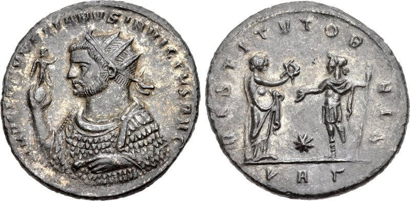 Antoniniano de Aureliano com legenda "Restituidor da Orbe"